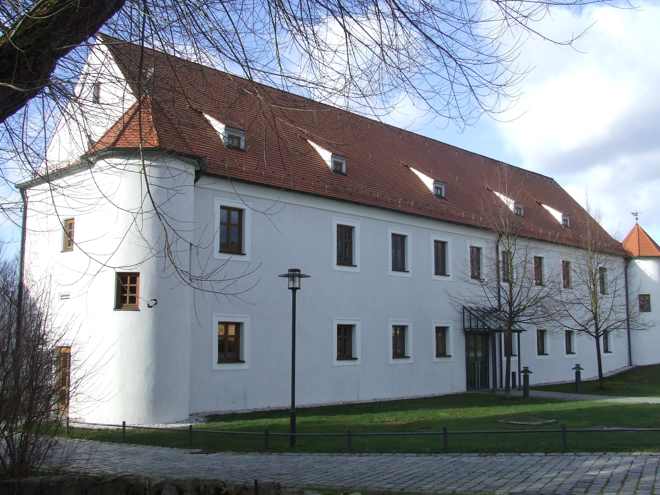 Ehemaliges Deutschordens-Pfleg-Schloss in Postbauer-Heng, Kreis Neumarkt in der Oberpfalz, heute als Kultur-Haus genutzt